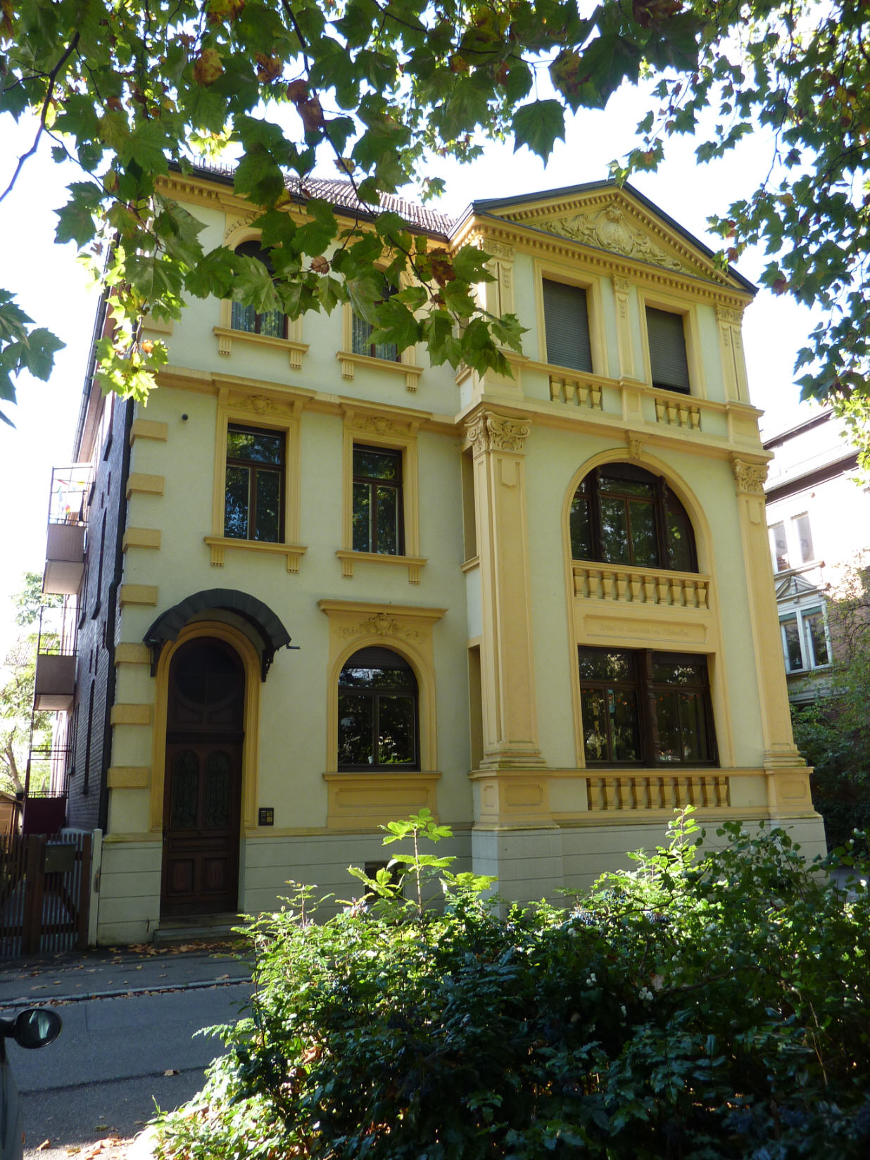 Deffnerstr. 5, Esslingen